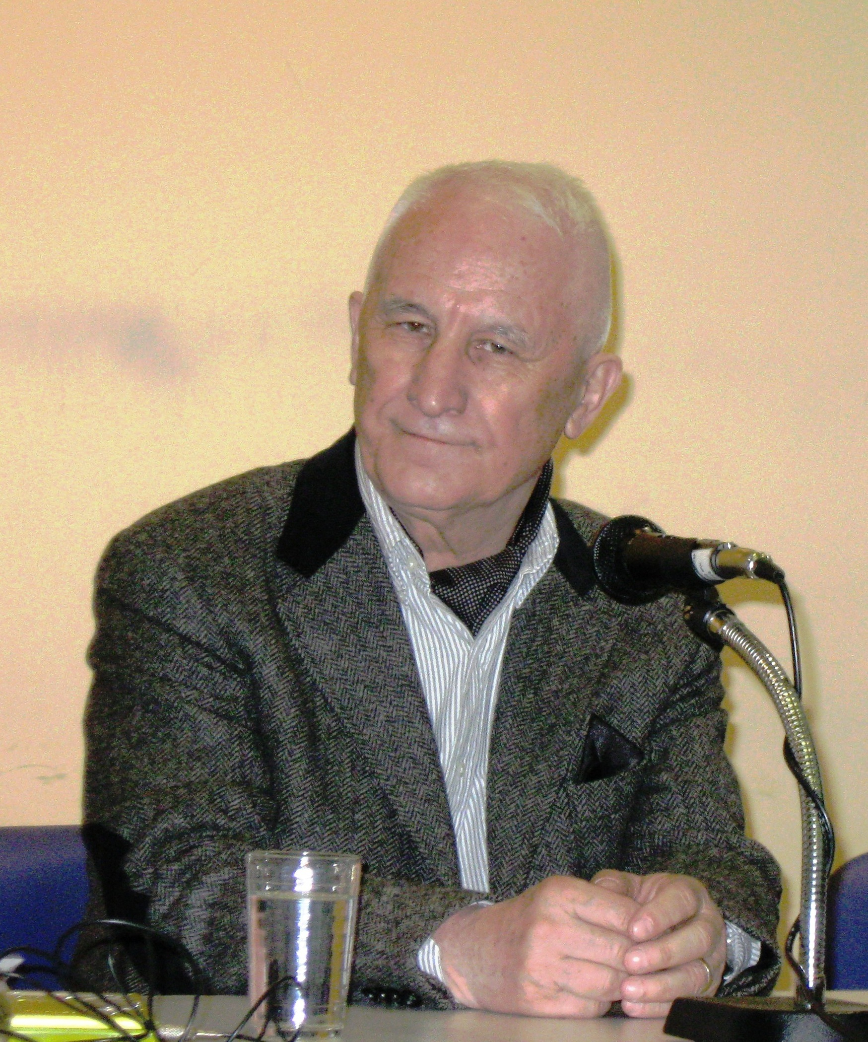 Матија Бећковић. Снимио Радосав Стојановић